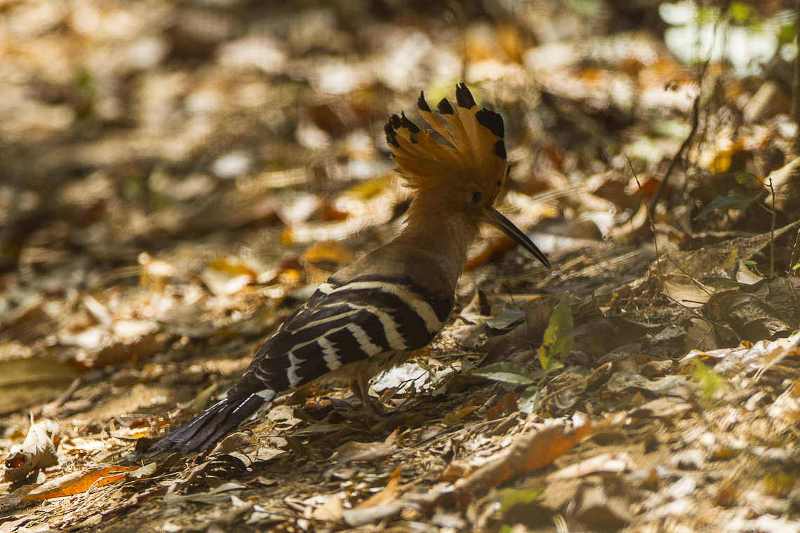 Madagascar Hoopoe - Ankarafantsika - Madagascar_S4E9386